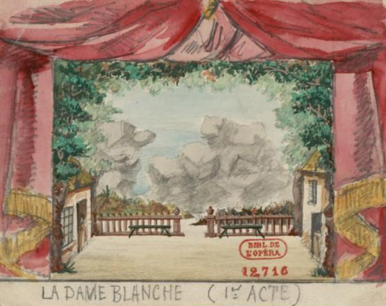 Esquisse de décor pour l'acte 1 de La Dame blanche de François Adrien Boieldieu